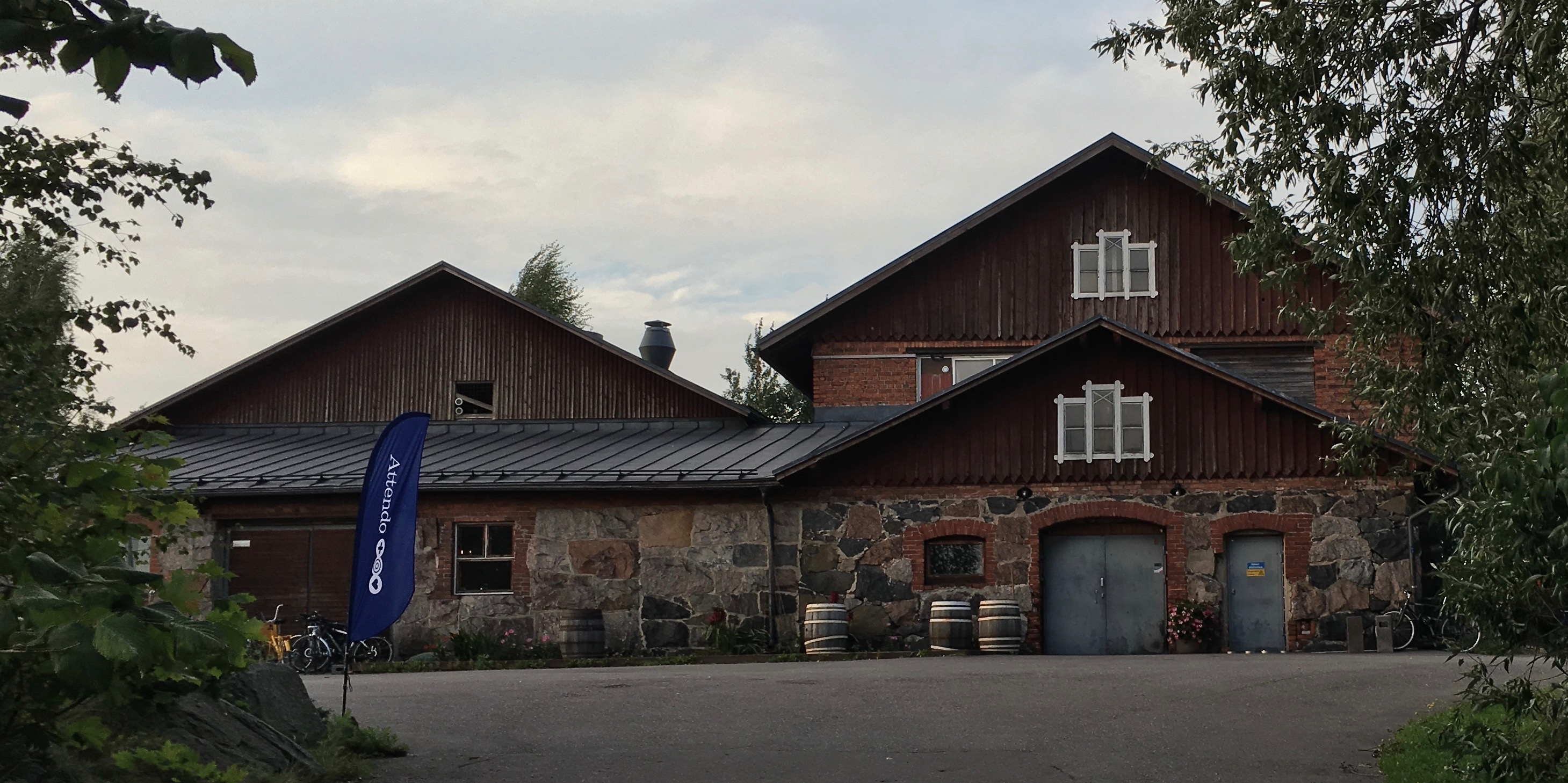 Argoksenmäen holvikellari, Helsinki